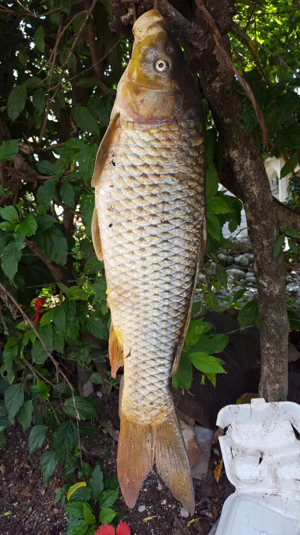 Une carpe herbibore